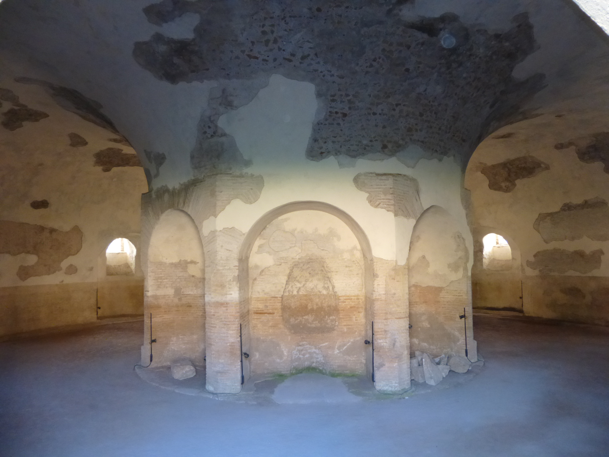 Roma, via Appia Antica, Villa di Massenzio. Mausoleo di Romolo, interno.